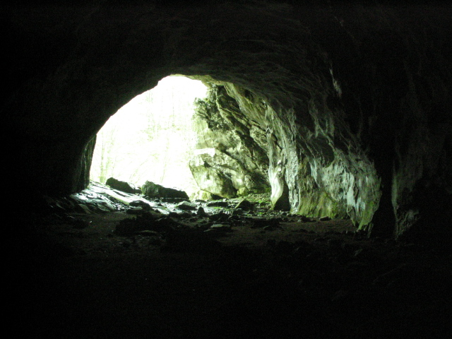 Itxinako Supelegor leizea.